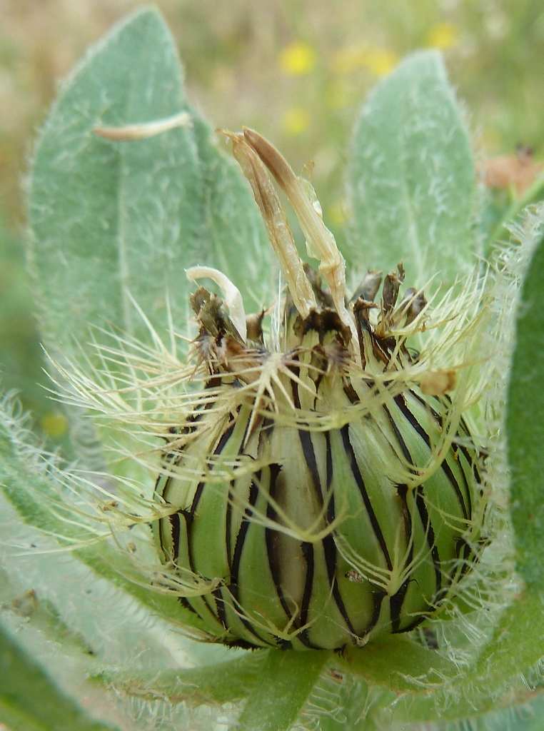 Centaurea pullata (Cabeza de pollo) : Capítulo post-antesis con las brácteas pectinadas bordeadas de negro - La Huerta, Albatera (Alicante, España).